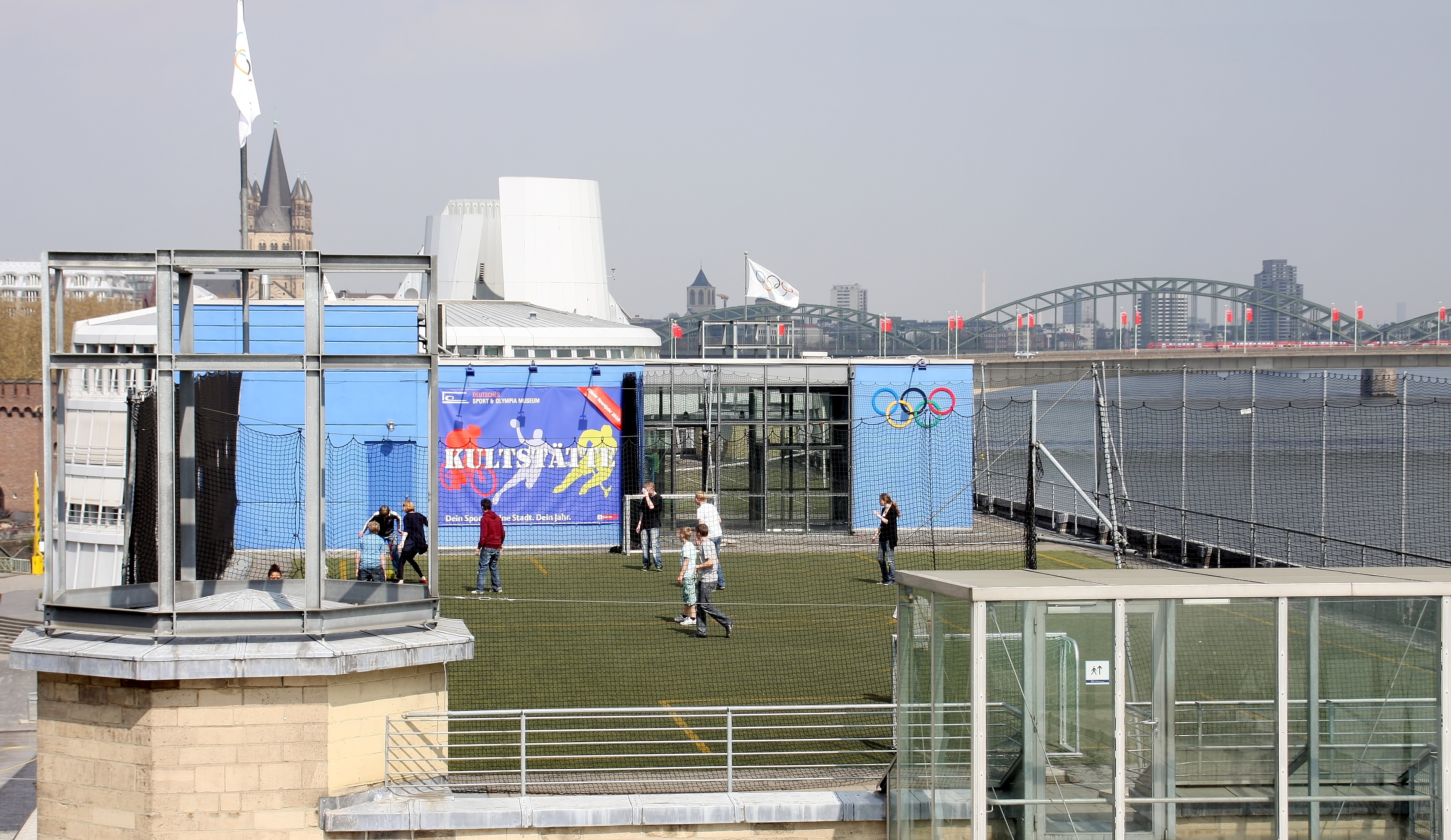 Rheinauhafen Köln - Deutsches Sport- und Olympiamuseum - Sportplatz auf dem Dach